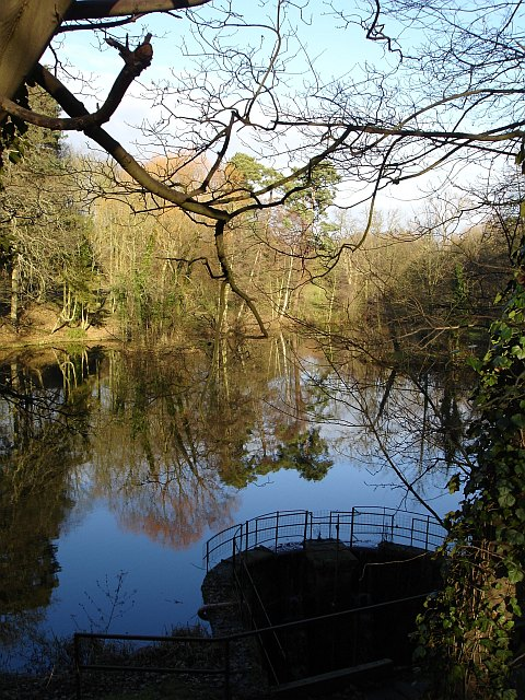 Major's Lake